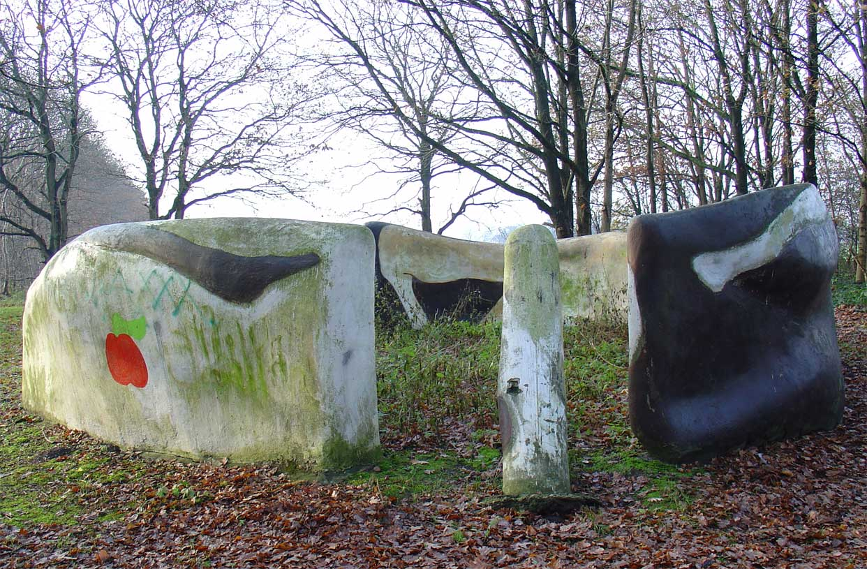 Fort Datema door Jan Brouwer in Veenhuizen nabij Onstwedde